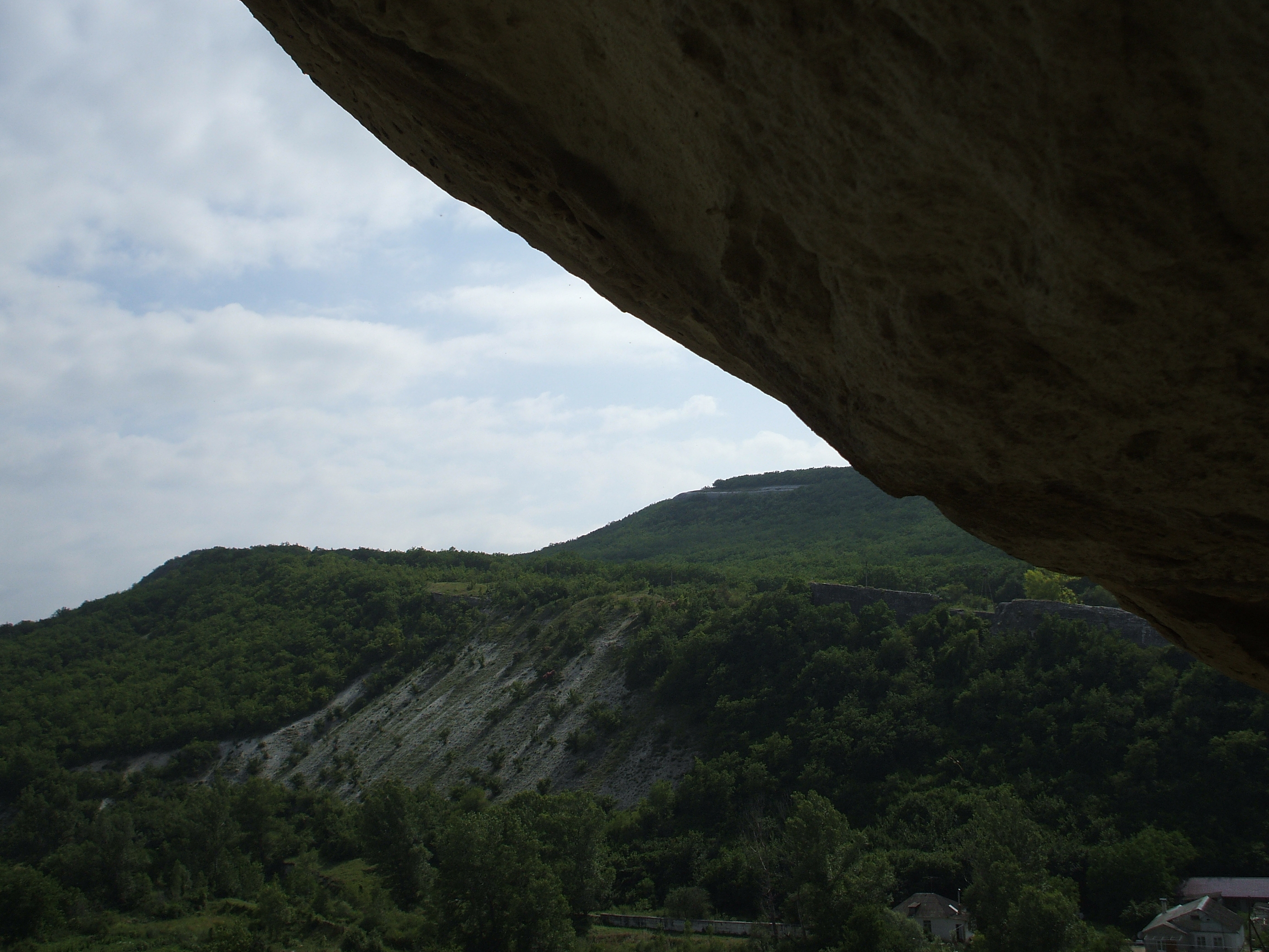 Шайтан-коба поселение древнего человека возле пещерного города Бакла